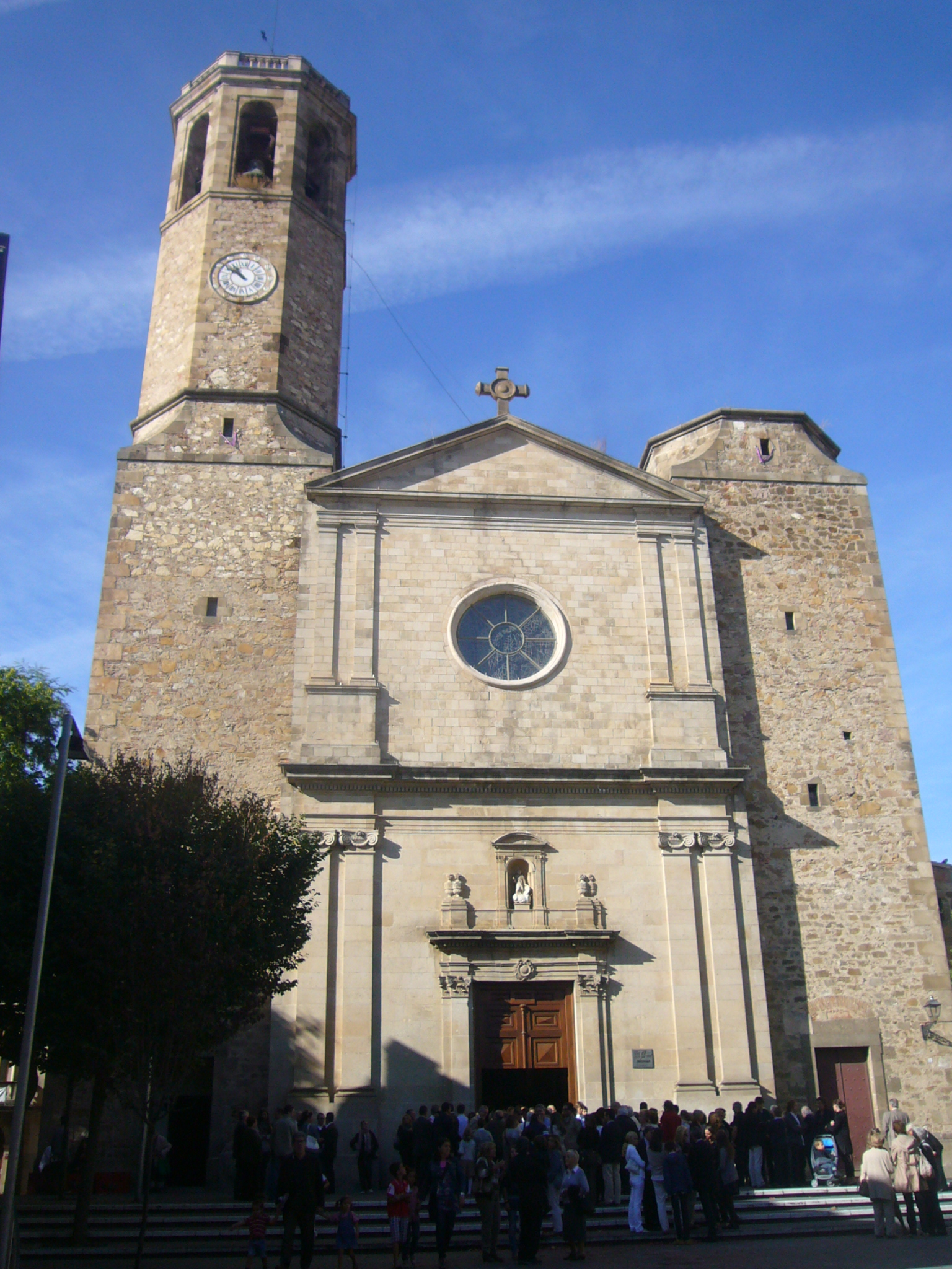 Església de Sant Vicenç de Sarrià en un dia festiu